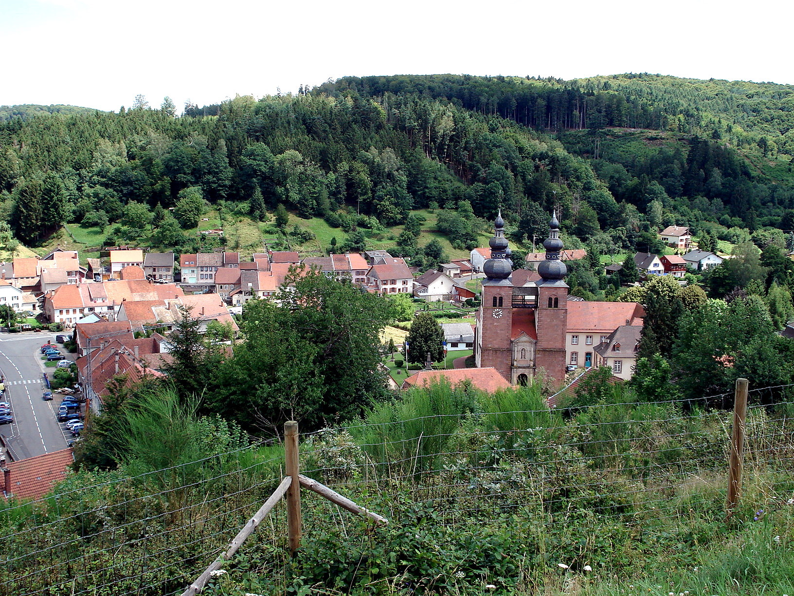 Saint-Quirin, dép. de la Moselle, France (région Lorraine). Vue générale depuis la Chapelle-Haute. Au centre droit de la photo: église Saint-Quirin (1722), aux deux clochers à bulbe.